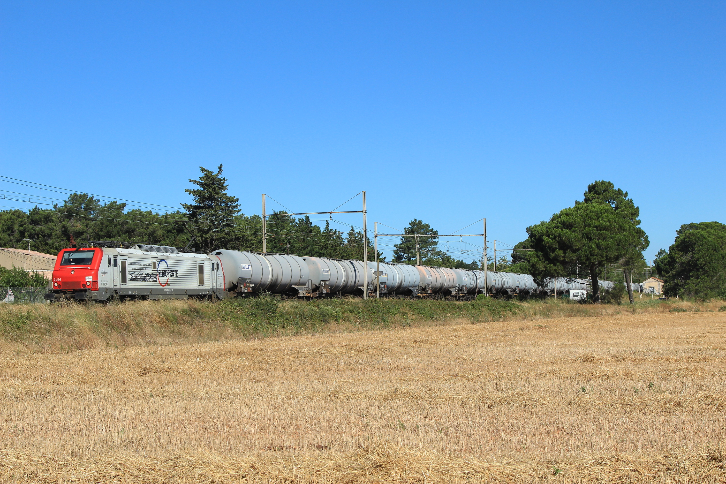 Un train de fret composé de citernes Millet et tiré par une locomotive "Europorte" E 37501 passe près de Jonquières-Saint-Vincent.